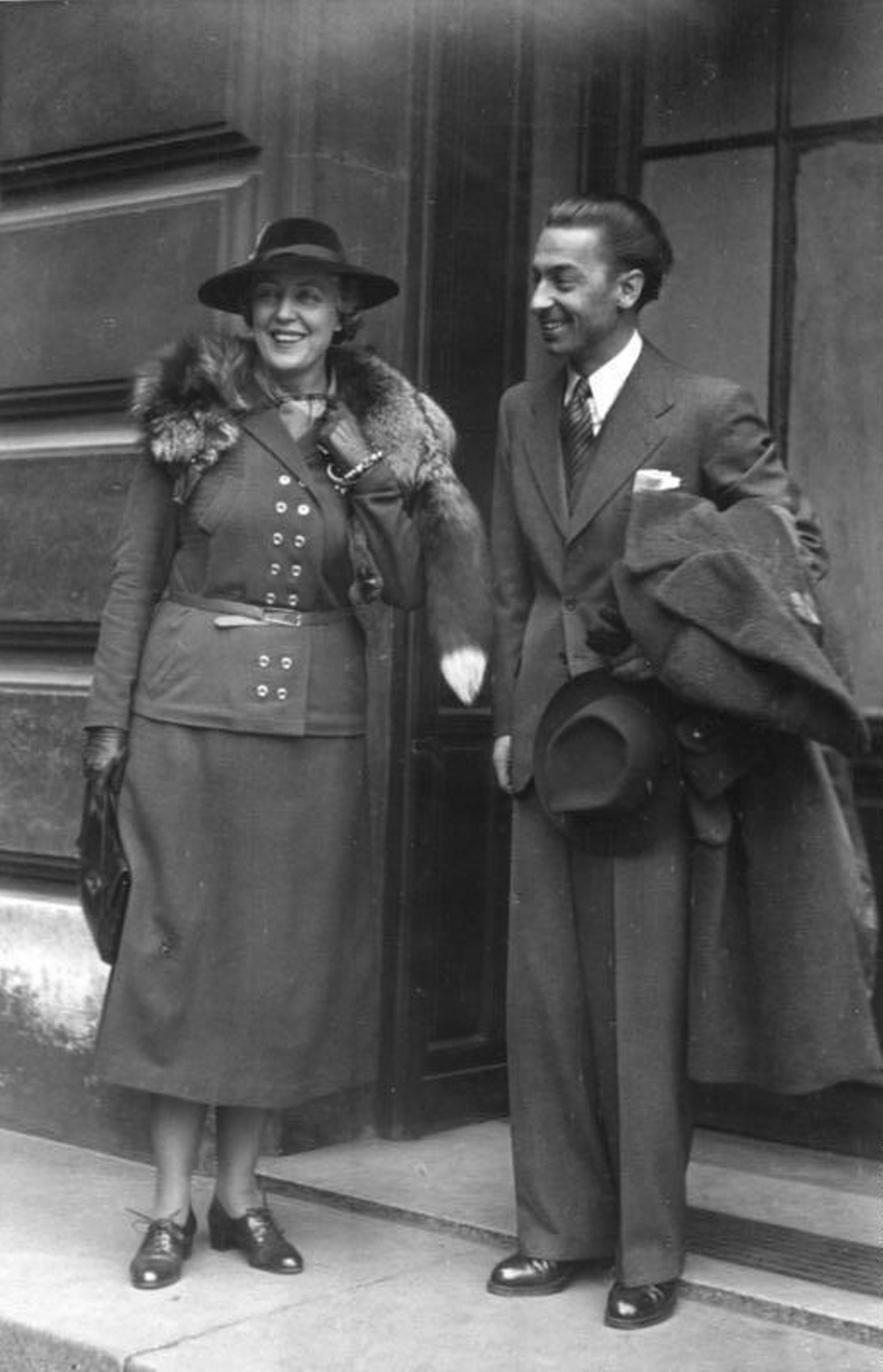 Herbert von Karajan und Germaine Lubin Herbert von Karajan und Mme. Germaine Lubin vor dem Bühneneingang der Pariser Oper, in der er die "Entführung aus dem Serail" dirigieren wird. (17.5.1941) [Paris, Herbert von Karajan und Germaine Lubin] Abgebildete Personen: Karajan, Herbert von: Dirigent, Generalmusikdirektor der Wiener Staatsoper, Österreich